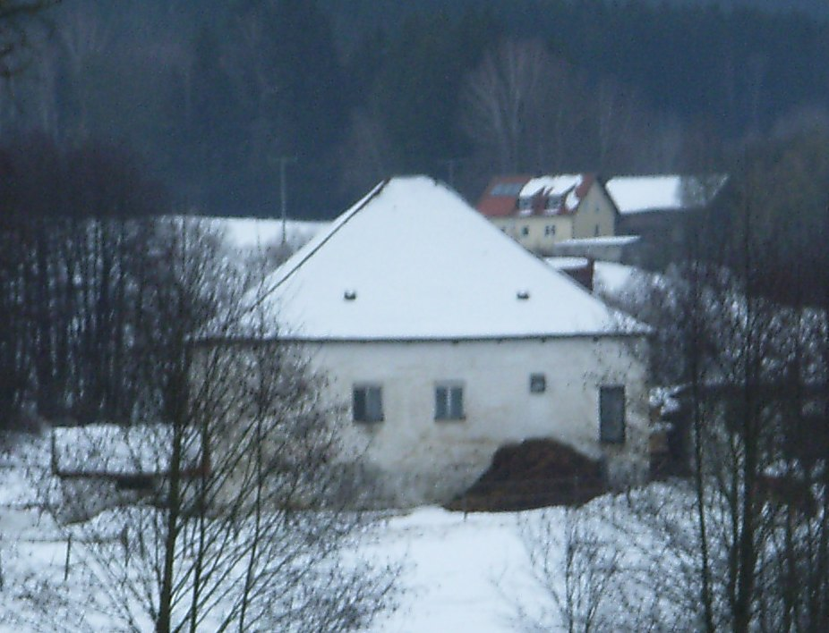 Alte Mühle in Löwenthal 2